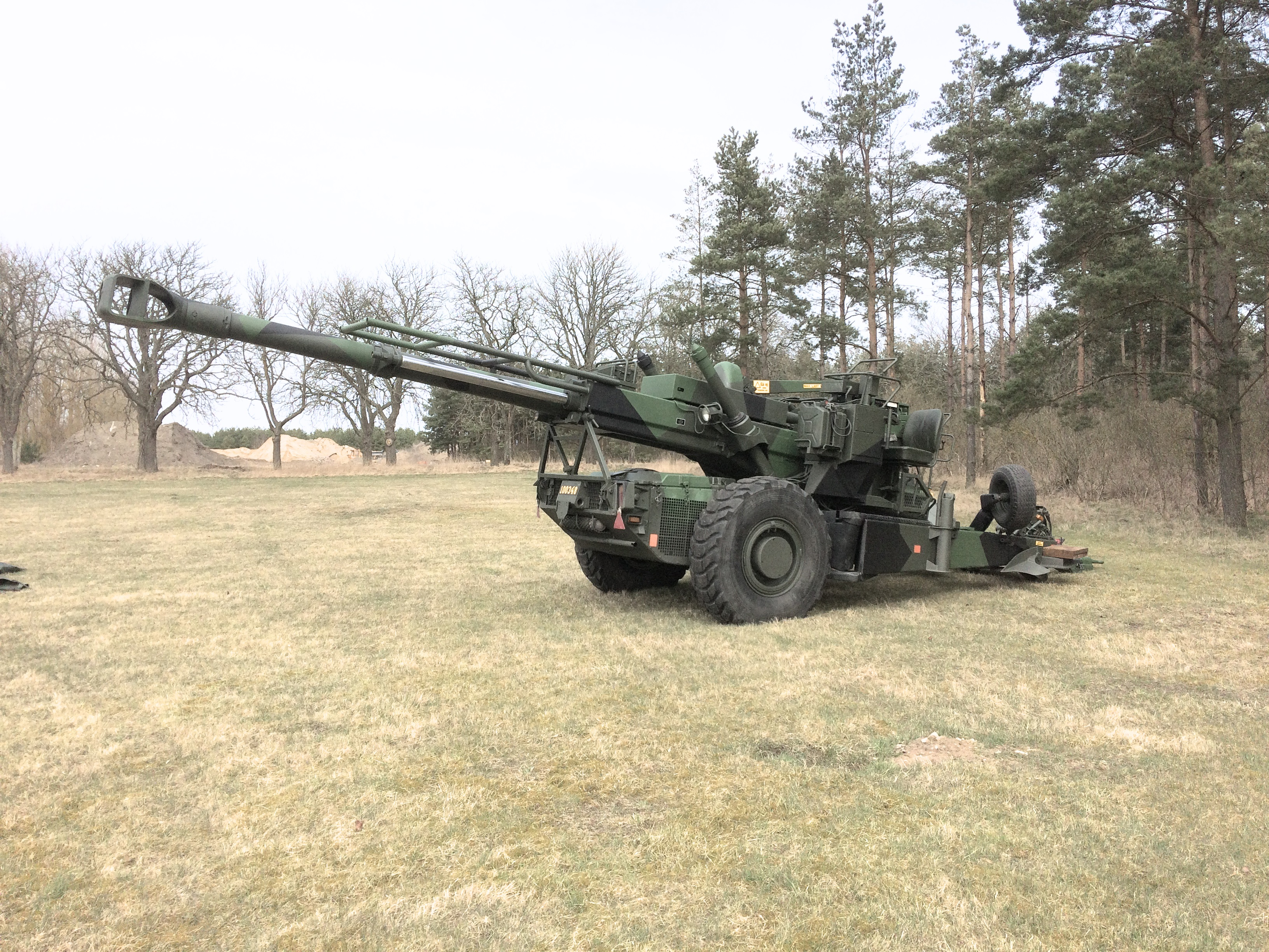 Artilleripjäs